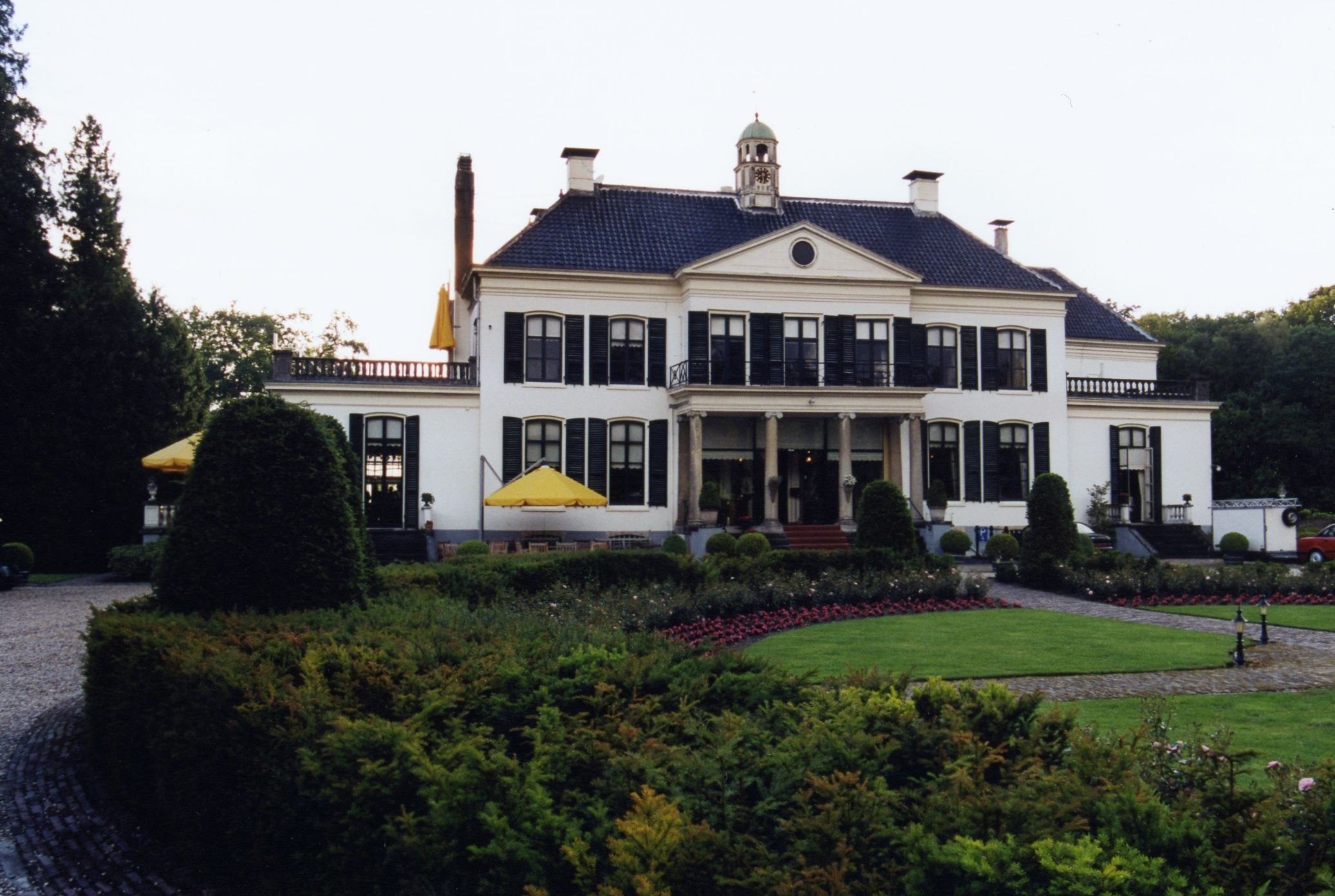 Kasteel Engelenburg te Brummen.